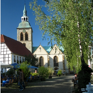 St. Aegidiuskirche Wiedenbrück, Südseite mit Marktplatz